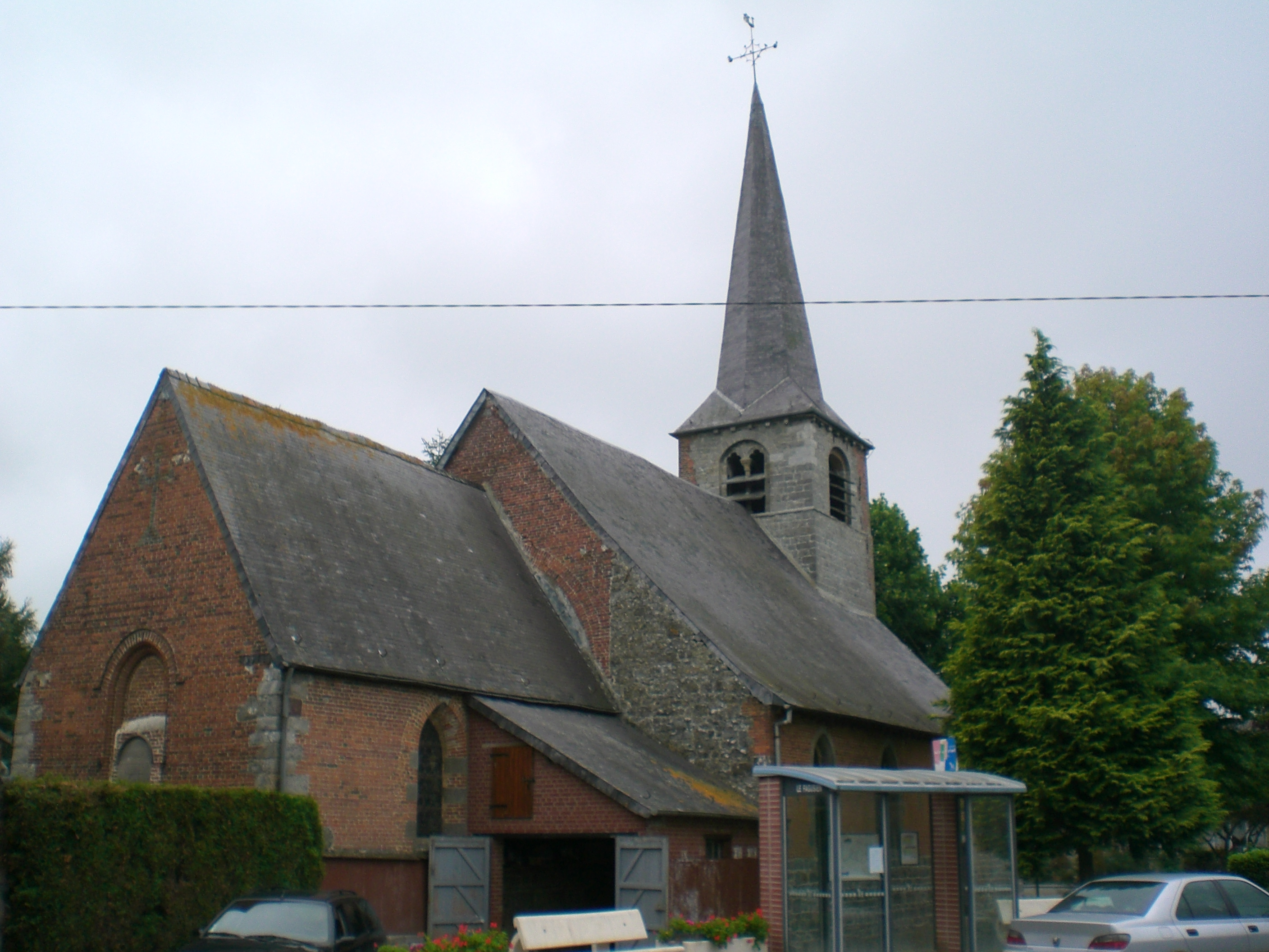 eglise de Petit-Fayt nord france